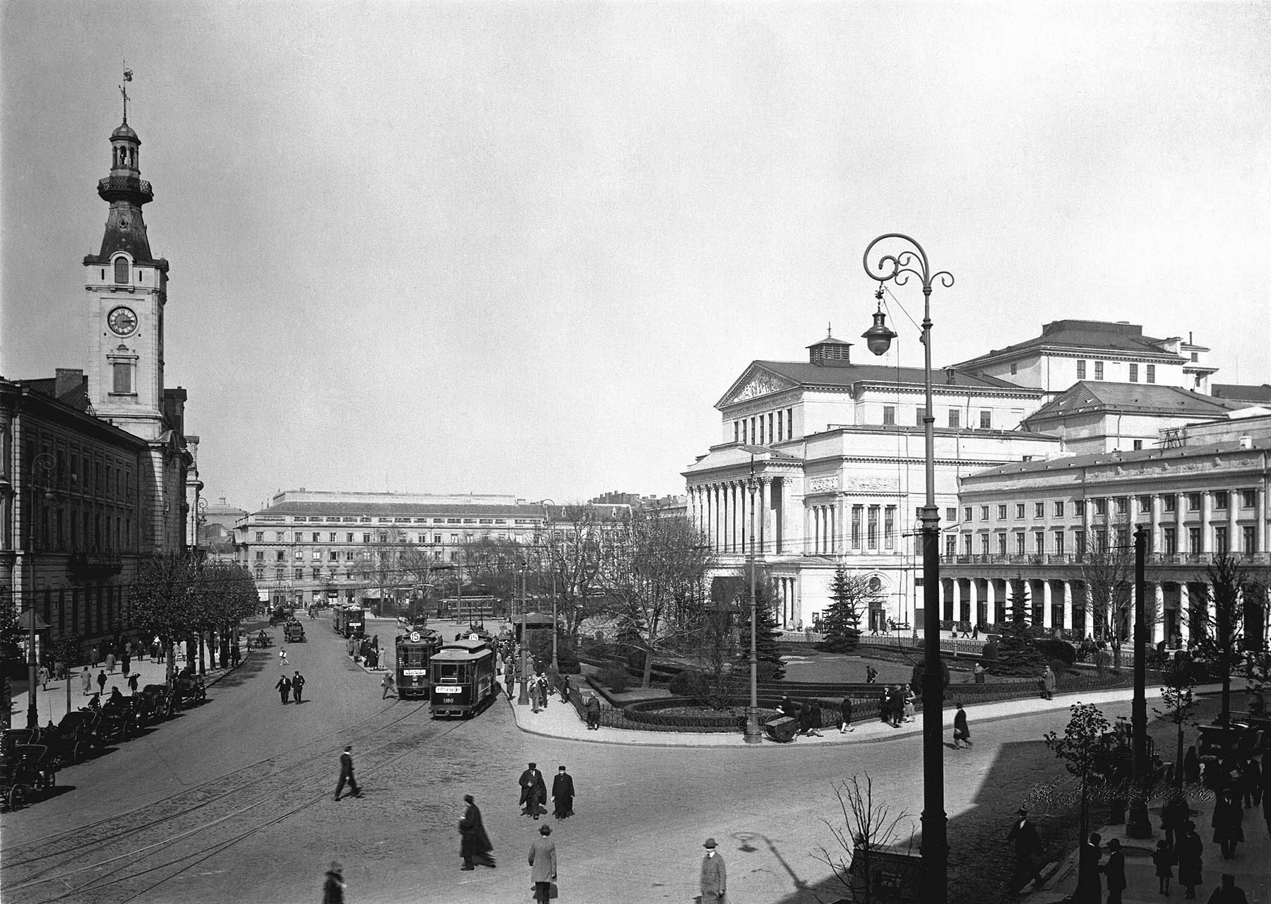 Teatr Wielki, Warszawa, Polska. Fotografia wykonana ok. 1925 roku